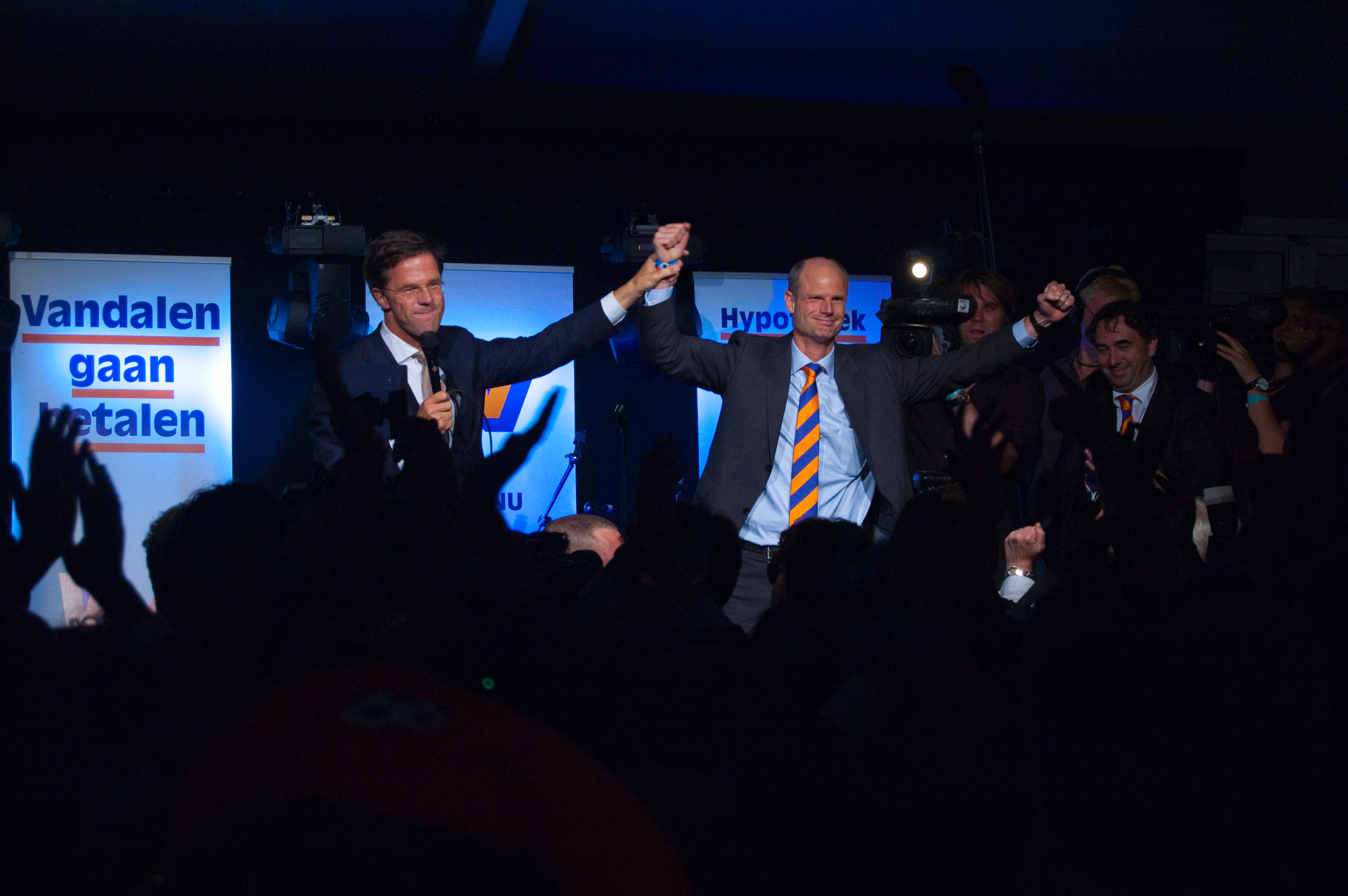 Mark Rutte en campagneleider Stef Blok vieren de overwinning.